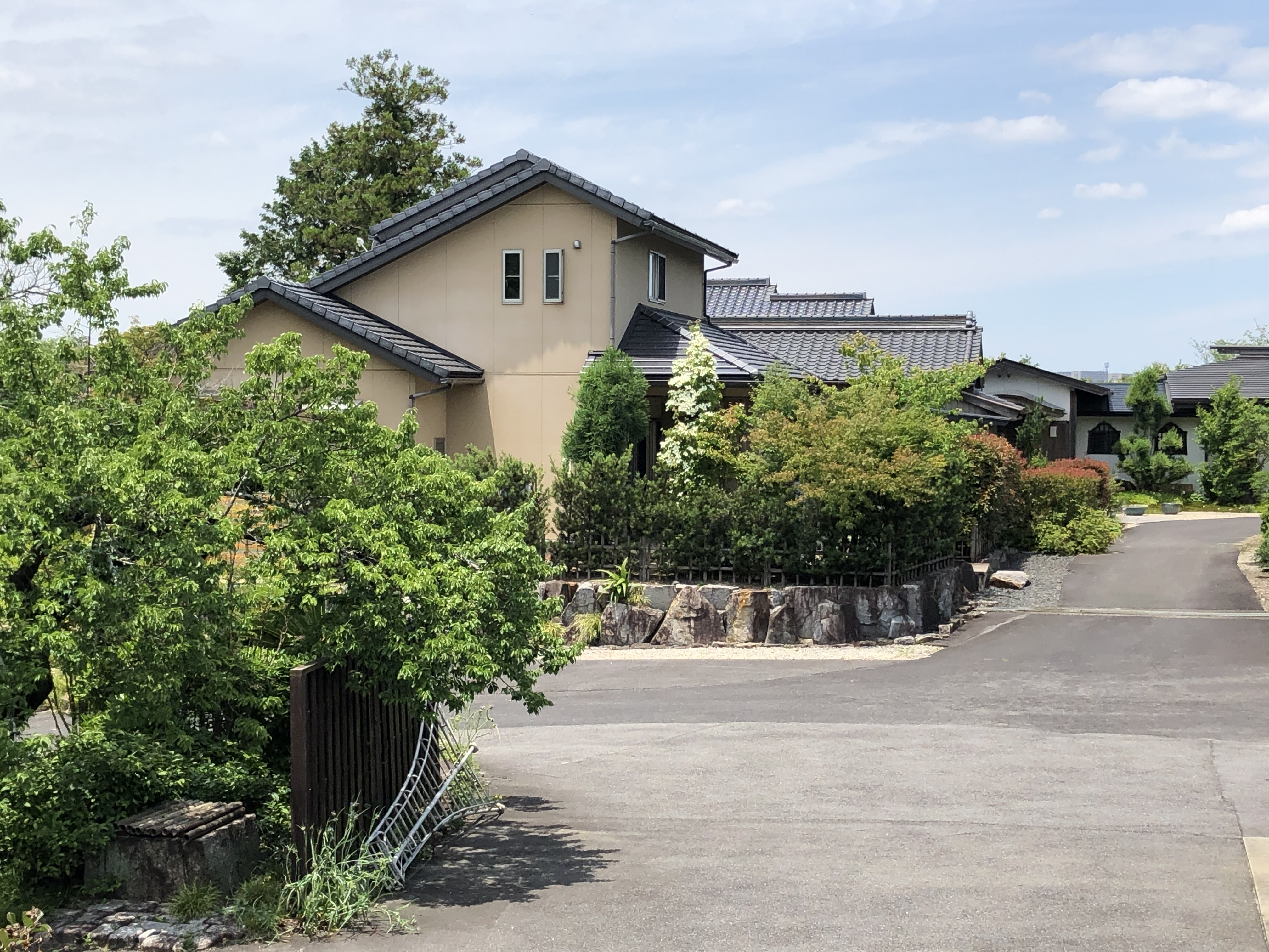 蓮性院（岡崎市細川町）